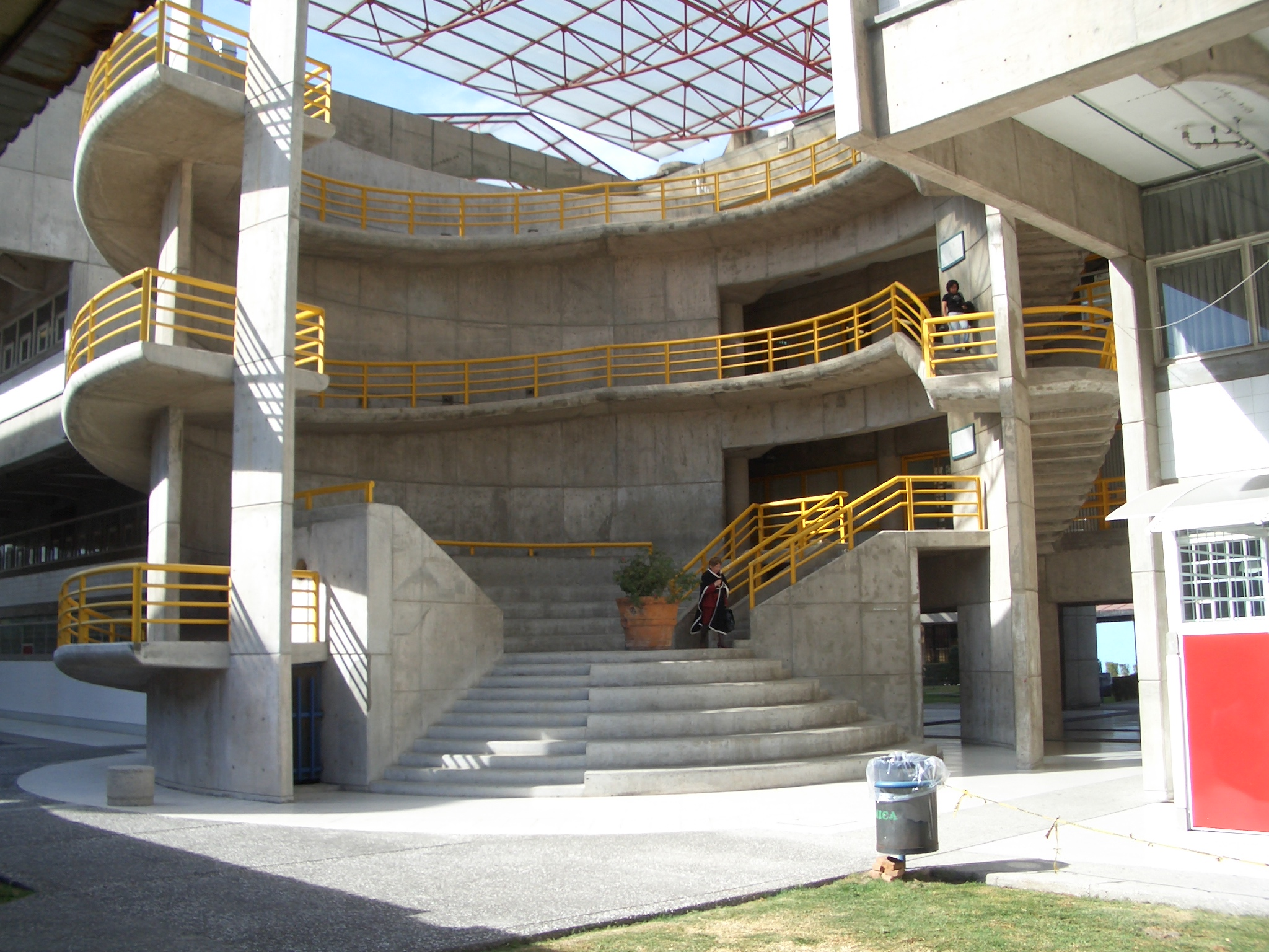 Fotografia del Edificio W